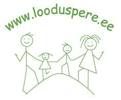 Looduspere logo